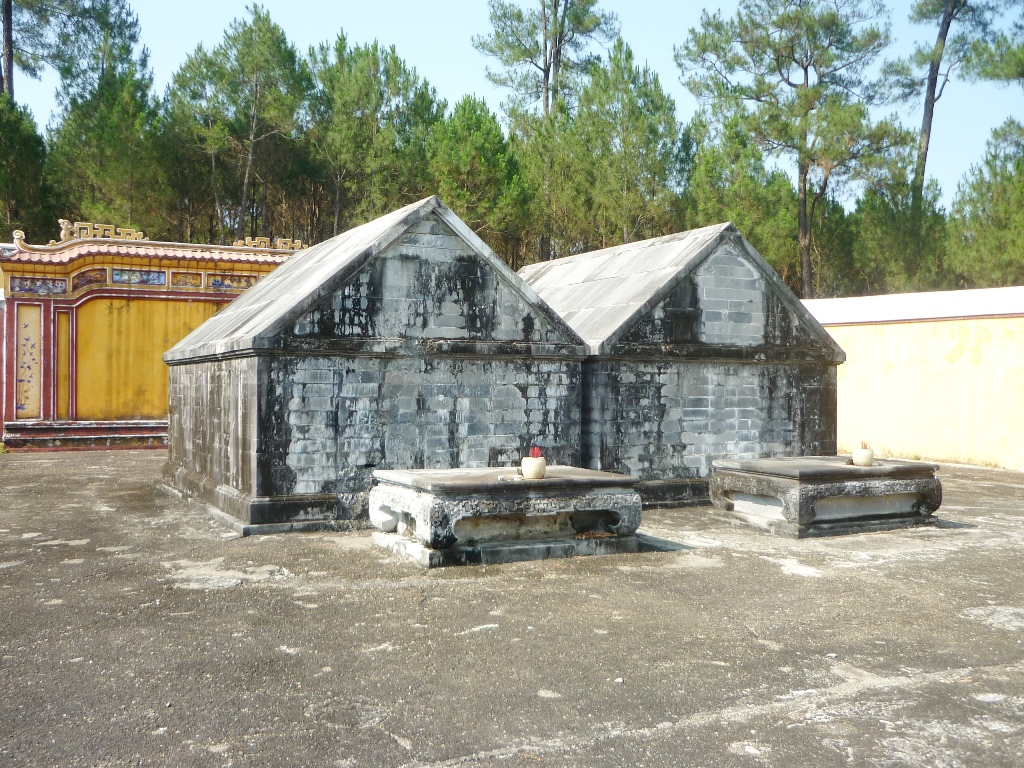 Tombe de l'empereur Gia Long près de Hué - Vietnam